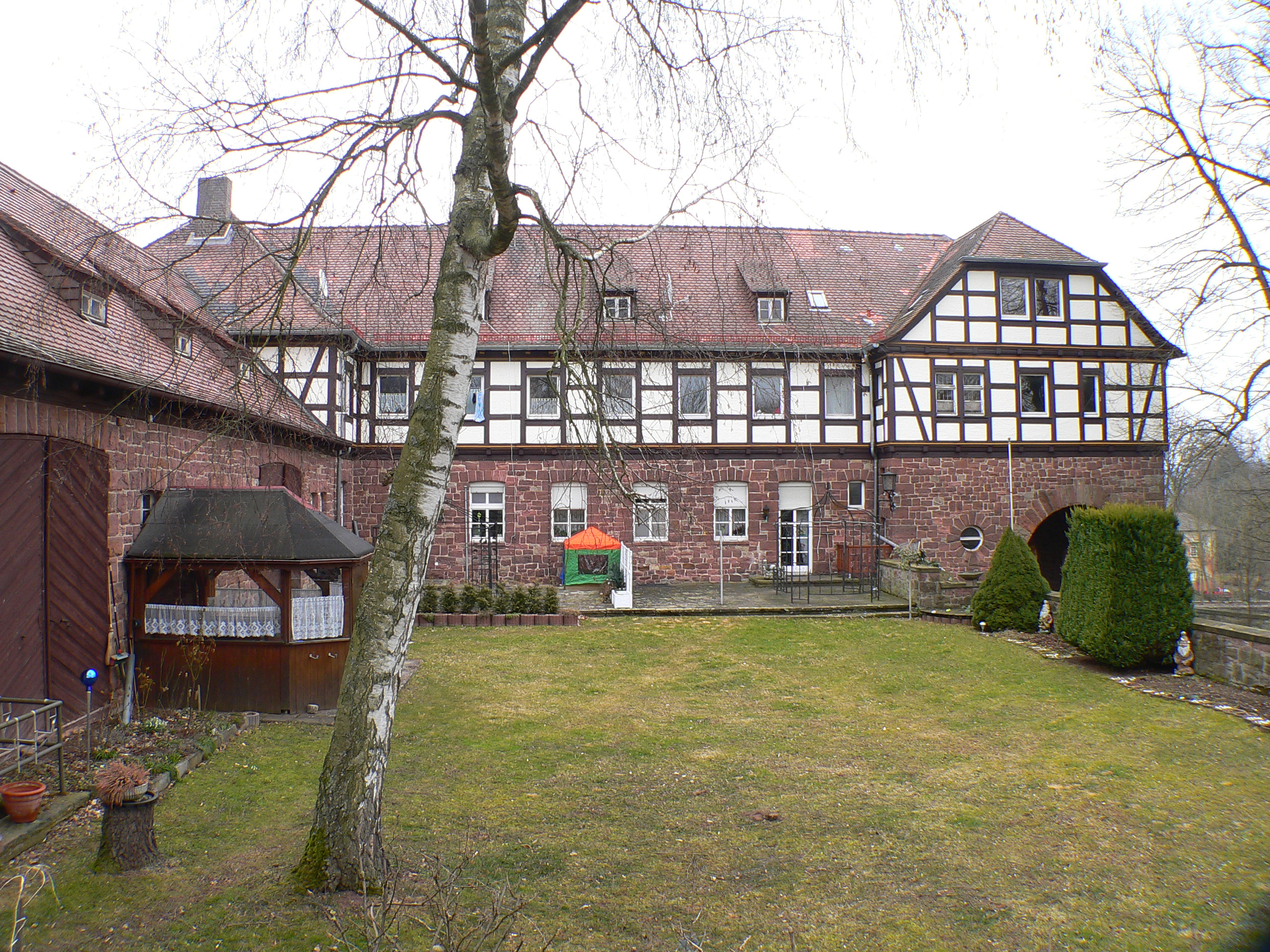 Eulenburg Mansbach in Hohenroda-Mansbach, Hessen, Regierungsbezirk Kassel, Landkreis Hersfeld-Rotenburg